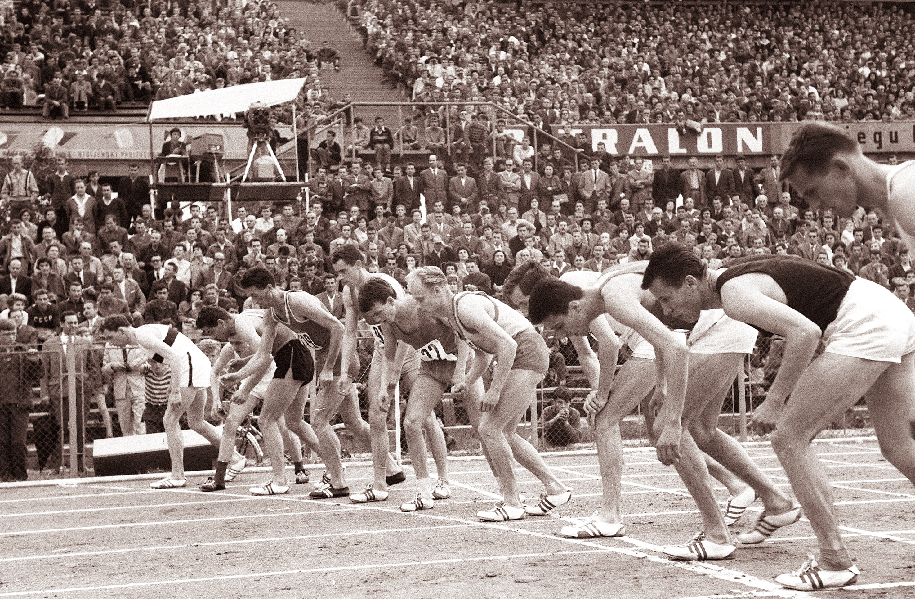 Mednarodni atletski miting v Zagrebu, start teka na 800 m